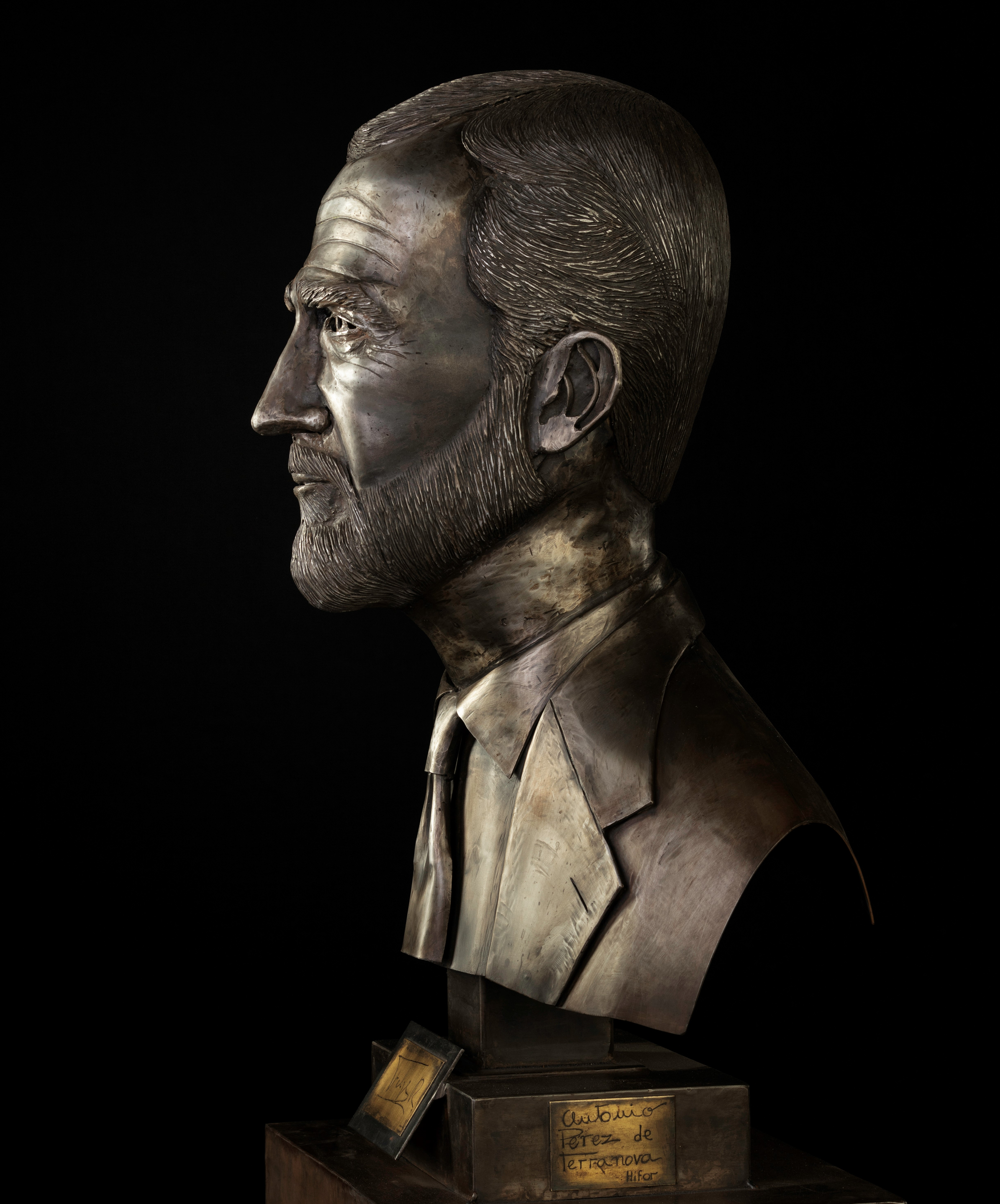 Estatua busto rey Felipe VI de España en chapa y alambre por Antonio El Ruso